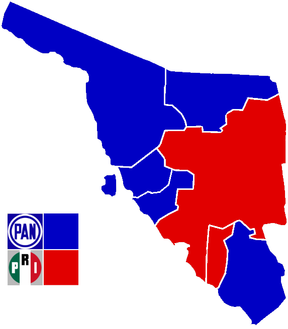 Distritos Electorales Federales de Sonora para la LXII Legislatura, basados en el partido del Diputado Federal que lo representa ante el Congreso de la Unión en la legislatura mencionada.